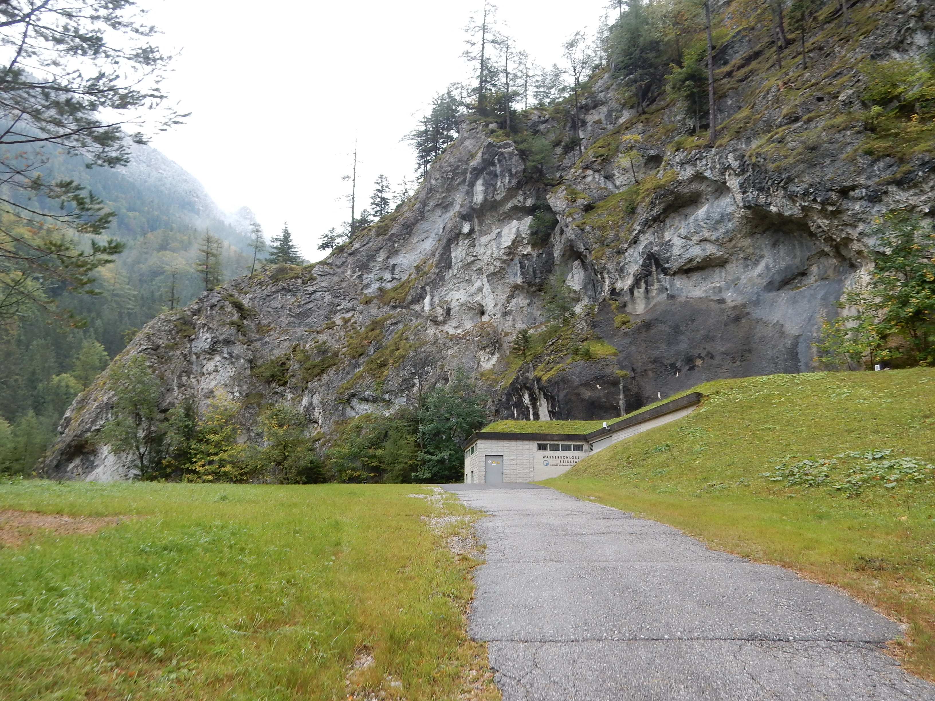 Wasserschloss Reißtal der I. Wiener Hochquellenwasserleitung